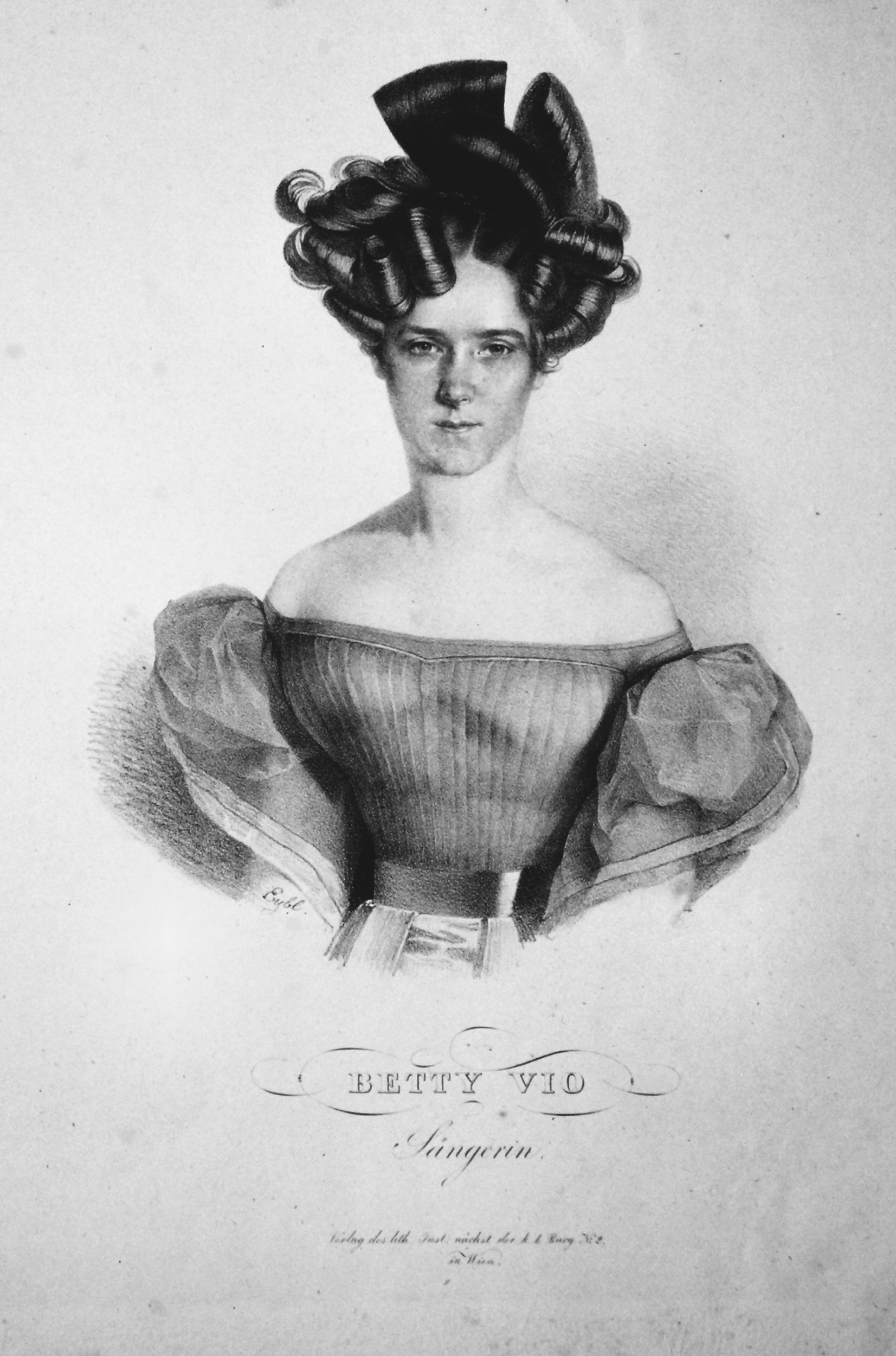 Betty Vio (1806-1872), Opernsängerin (Sopran). Lithographie von Franz Eybl um 1830